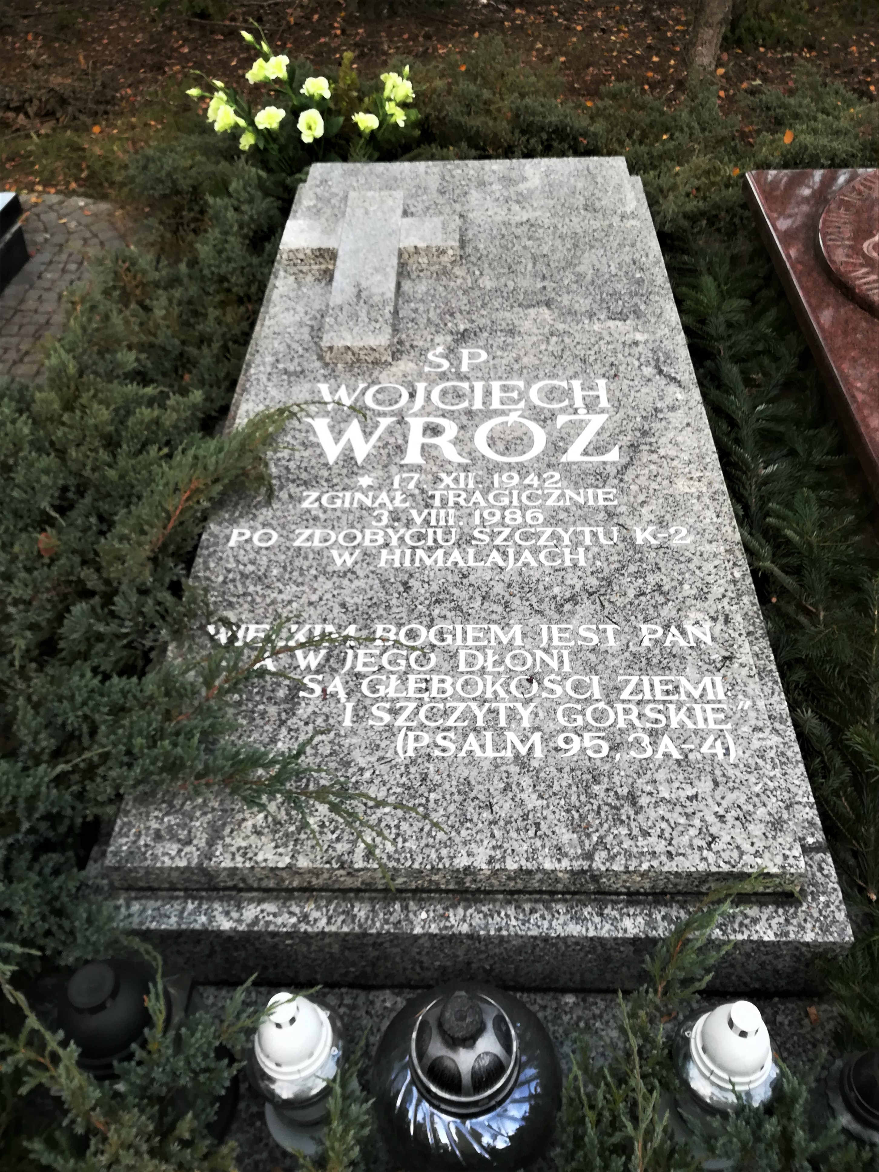 Grób Wojciecha Wróża na cm. junikowskim w Poznaniu.